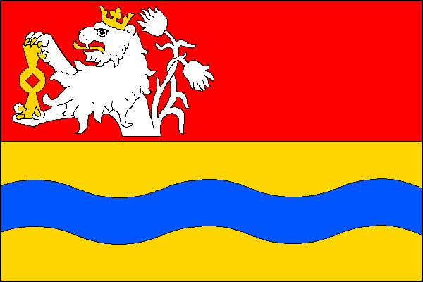 Vlajka obce Píšťany